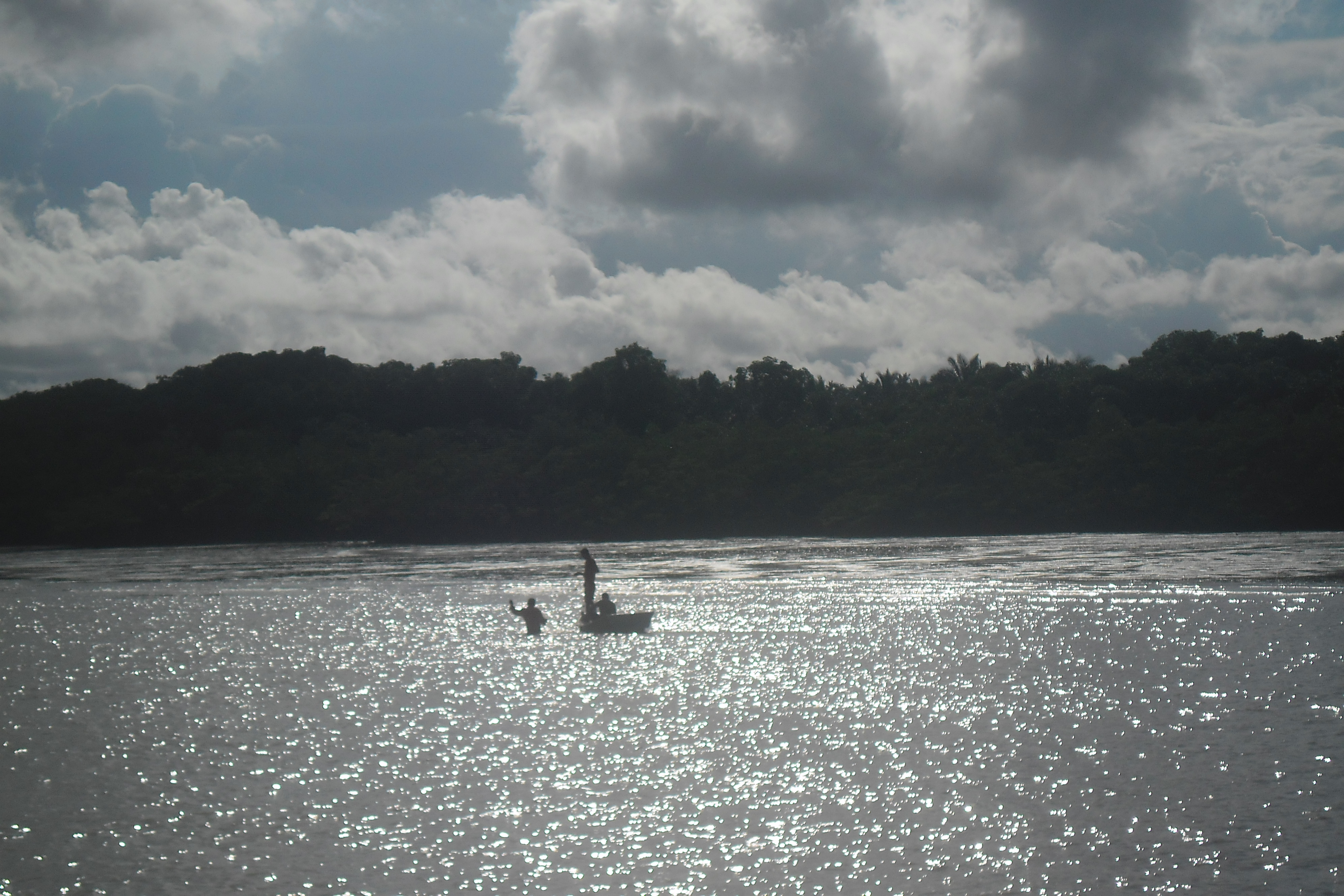 Sob o sol maranhense